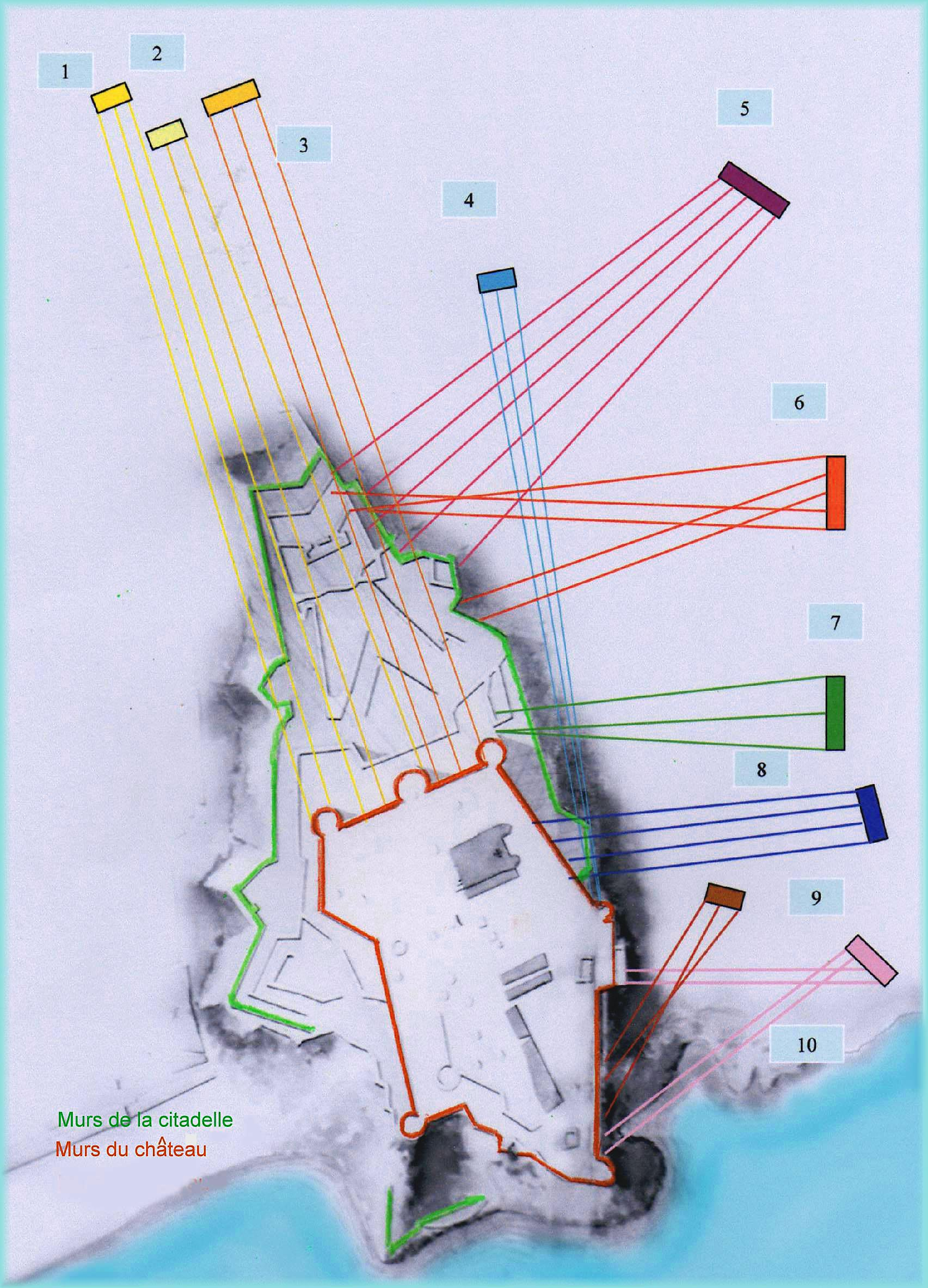 Batteries d'artillerie fin decembre 1705 autour du château de Nice